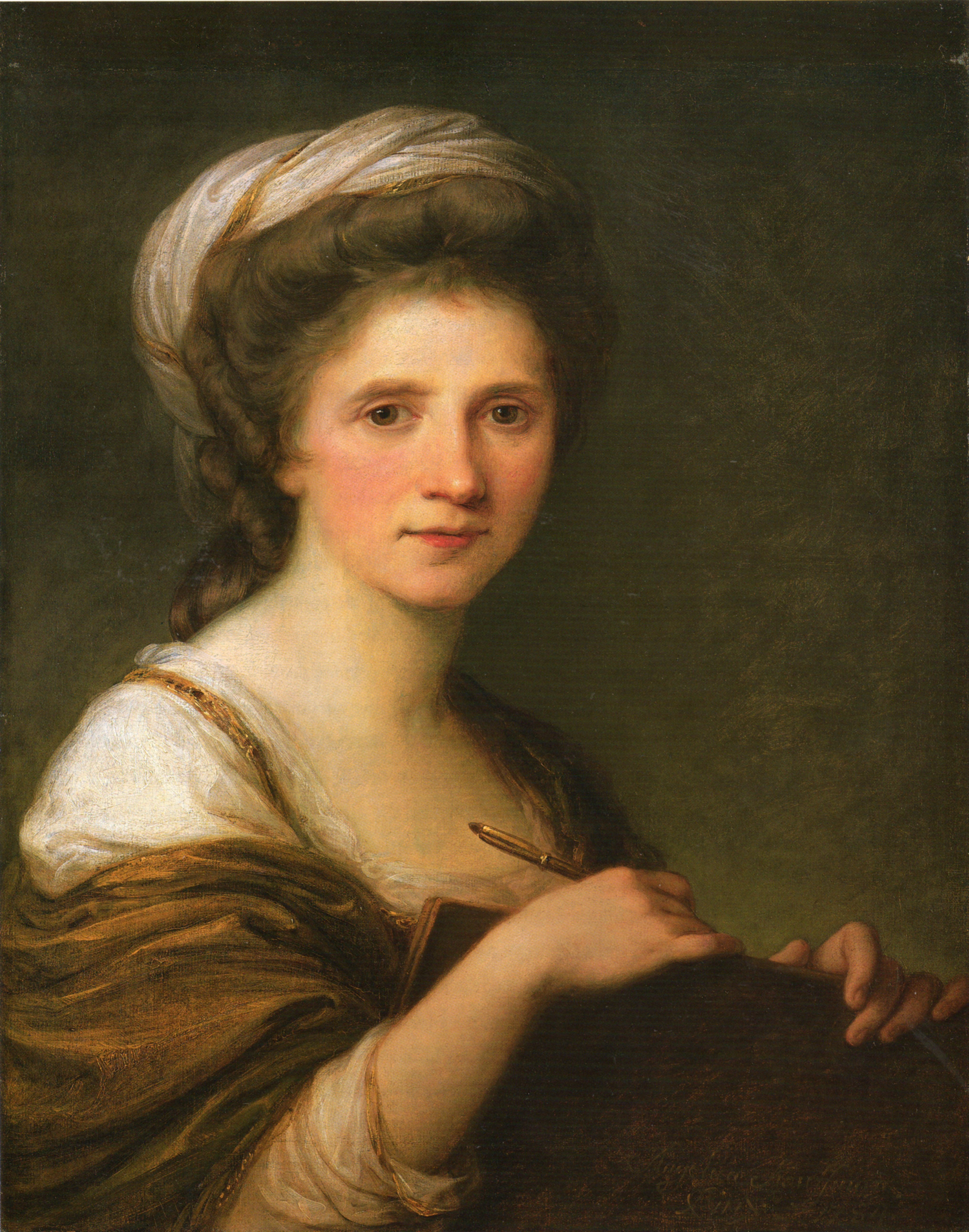 Die Künstlerin malte sich hier im Alter von 42 Jahren in weichen Farbtönen und mit einem modisch um ihr fülliges Haar gewundenen Turban.